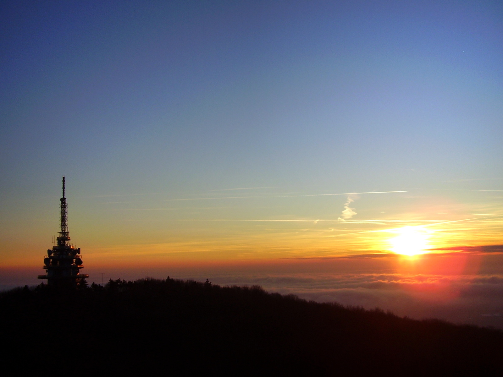 Západ slnka na Zobore.